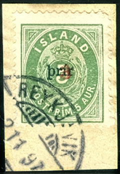 Почтовая марка Исландии на вырезке, погашенная штемпелем Рейкьявика